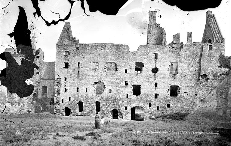 Façade cour du château de Suscinio (en ruines) par Mieusement.